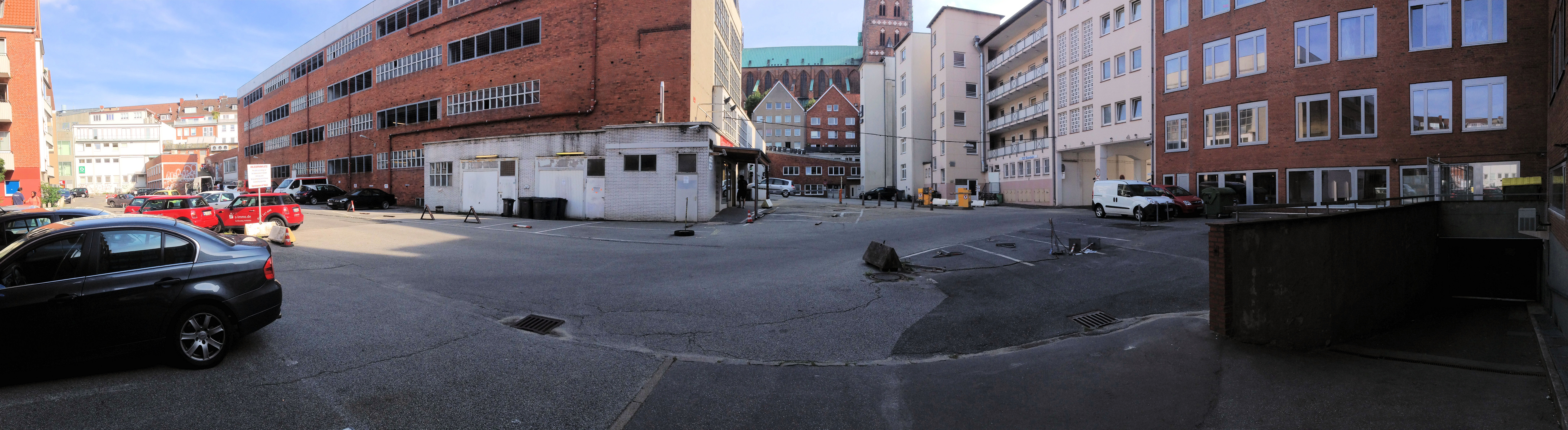 Der Wehdehof in Lübeck